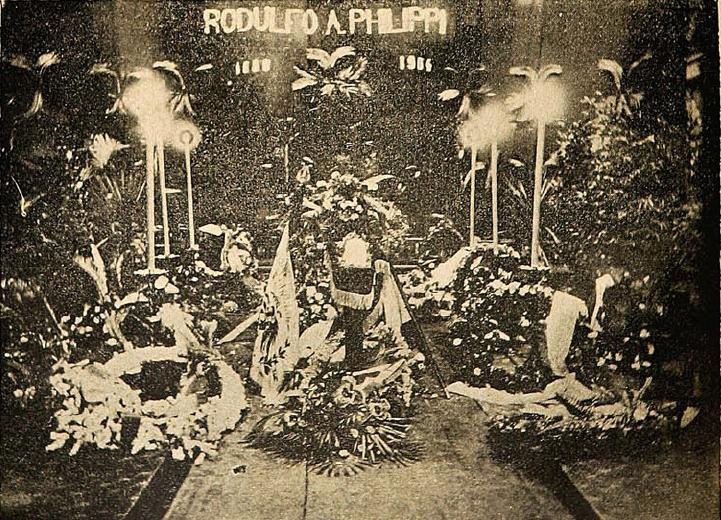 Velorio del sabio y naturalista alemán radicado en Chile Rudolf Amandus Philippi Krumwiede (* Charlottenburg, (Berlín, Alemania) 14 de septiembre de 1808 - Santiago de Chile, 23 de julio de 1904)